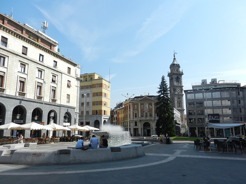 Varese - Piazza Monte Grappa